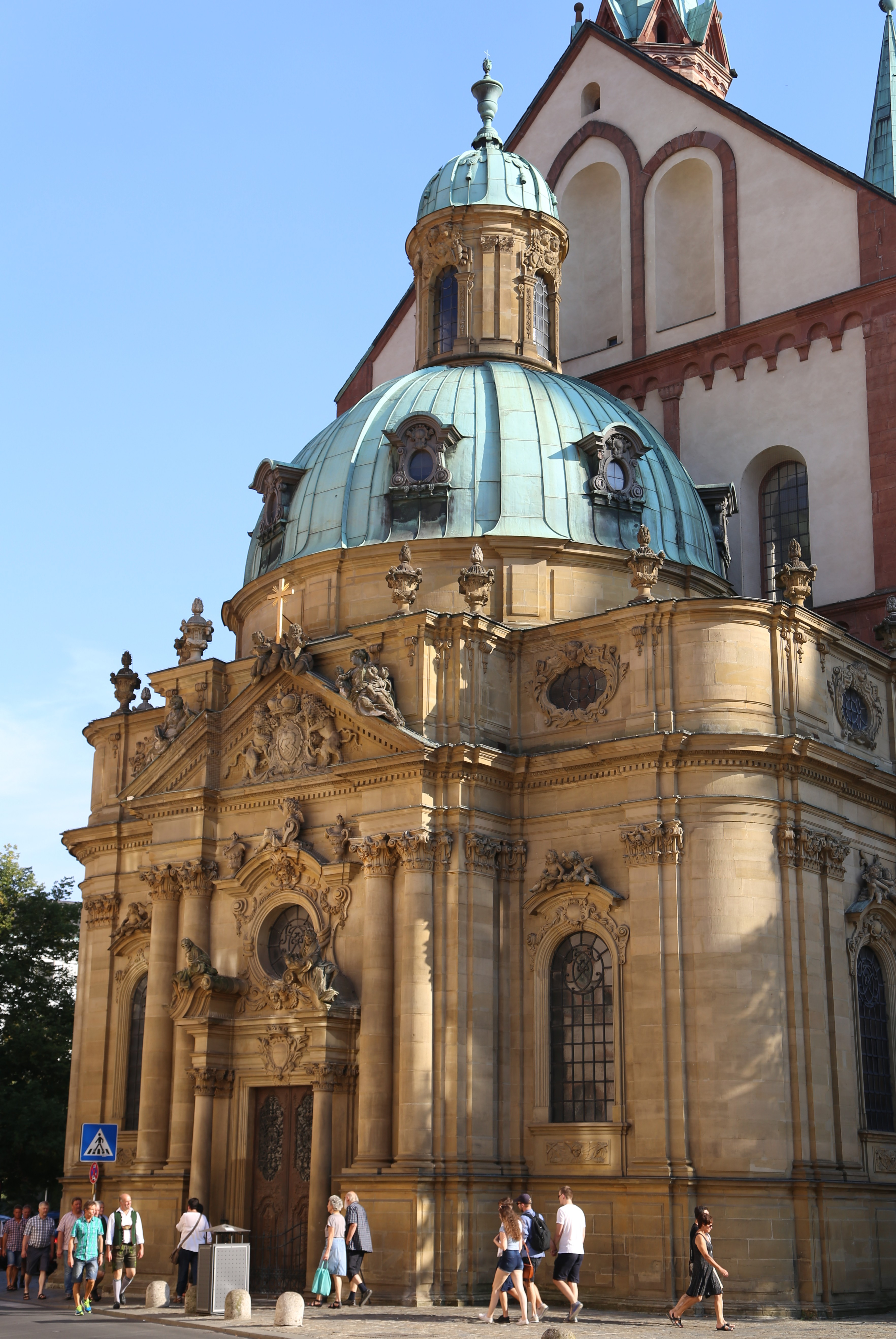 Kiliansplatz, Würzburg; Grabkapelle, sogenannte Schönbornkapelle, überkuppelter Zentralbau mit Laterne, Sandsteinquaderbau mit Figurenportal, Barock, Balthasar Neumann nach Plänen von Johann Maximilian von Welsch unter Einfluss eines Entwurfs von Johann Lucas von Hildebrandt, 1721–1736; mit Ausstattung